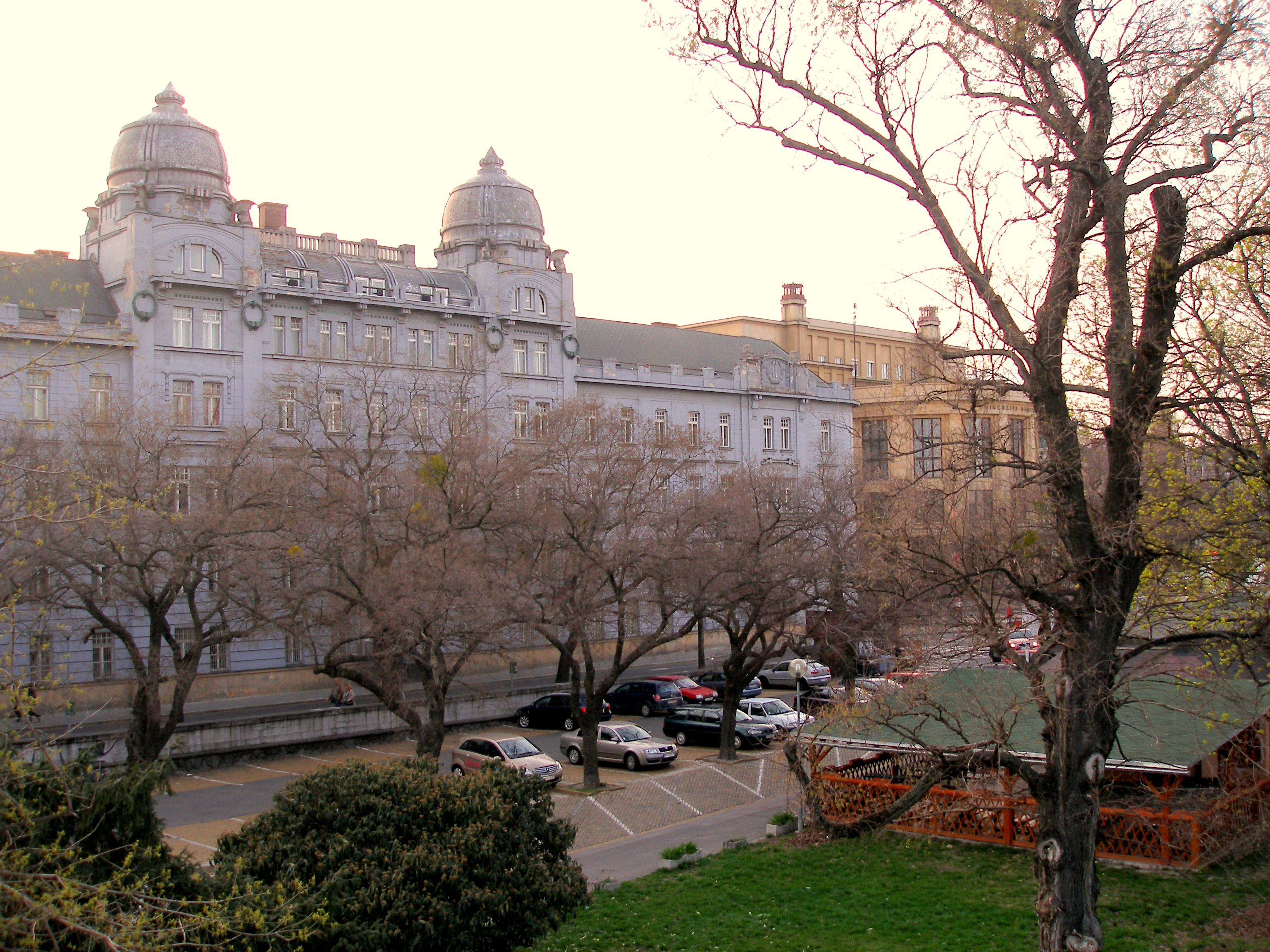 Bratislava pri Starom moste, budova filozofickej a právnickej fakulty.